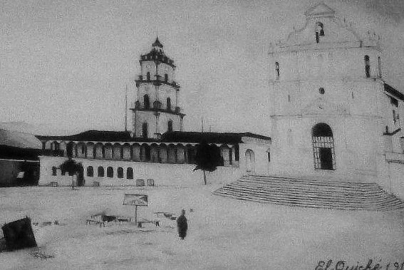 Plaza central de Santa Cruz del Quiché, 1910.